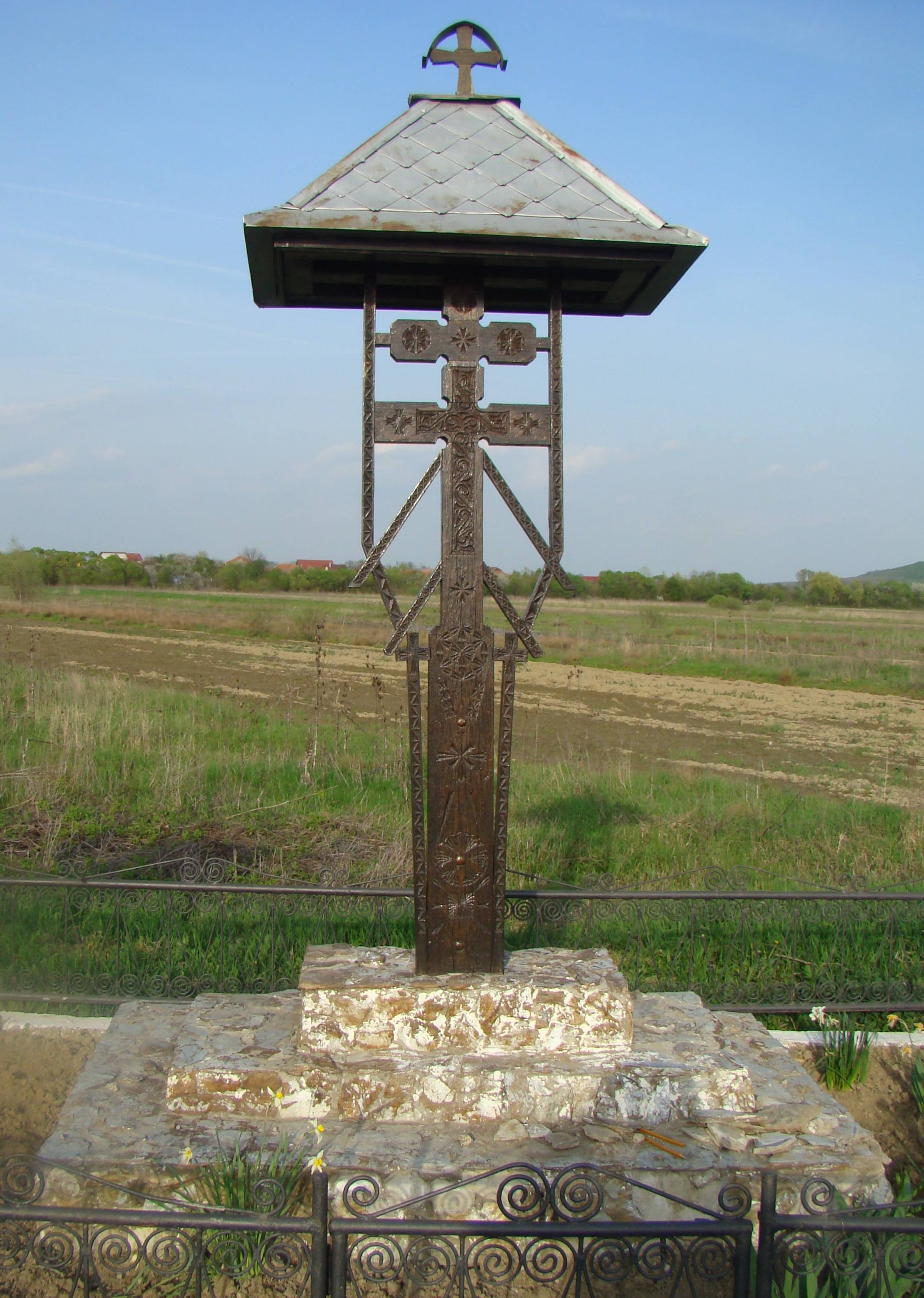 Troiță de lemn, sat Câlnic; comuna Câlnic 01